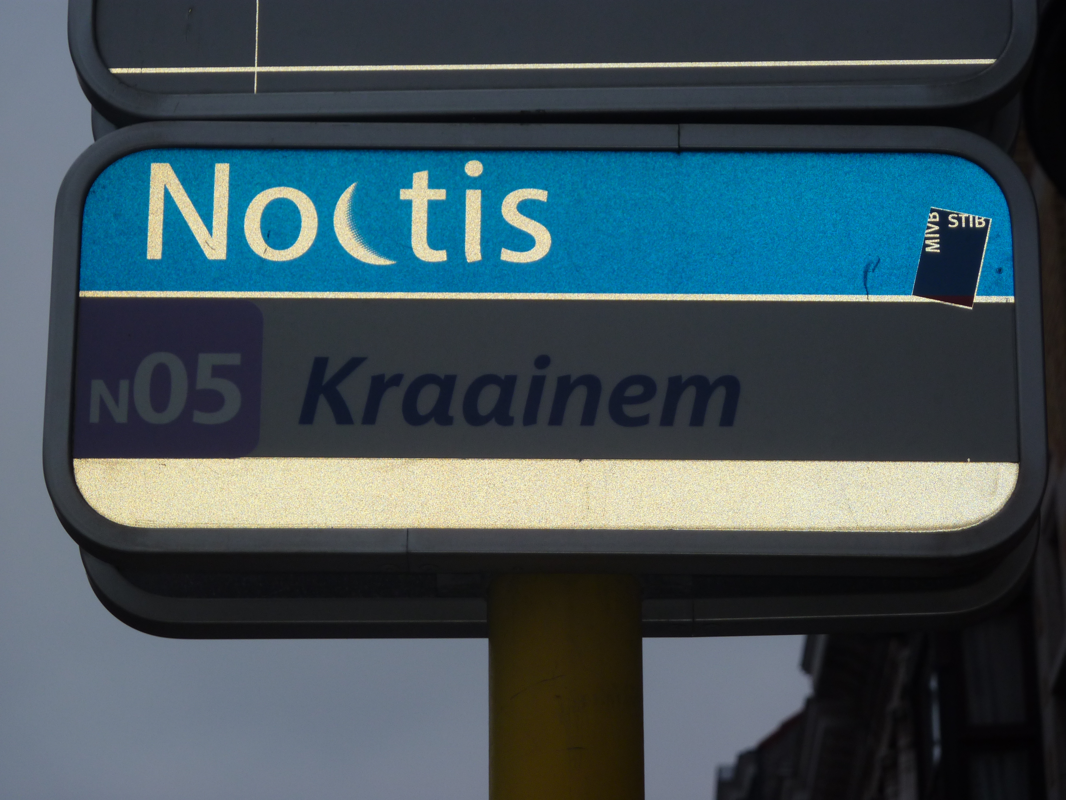 Plaque d'un arrêt de bus Noctis N05 à Bruxelles.